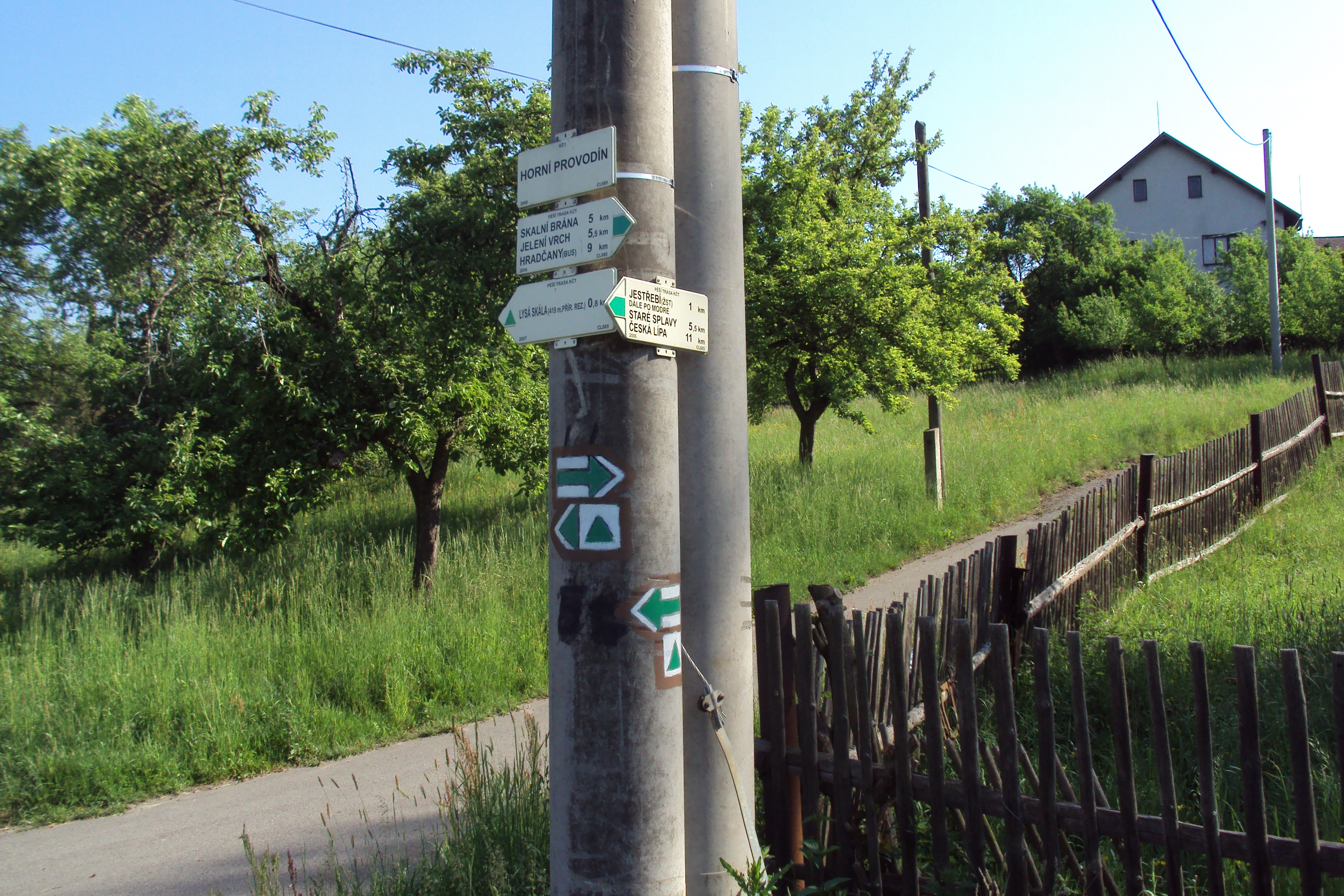 Rozcestník na katastru Provodín, část Horní Provodín, zelená s odbočkou na skály